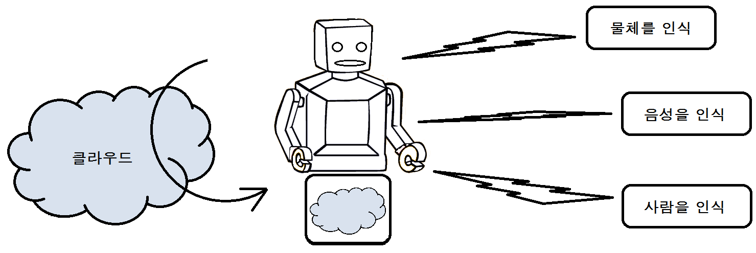 클라우드 로봇 유형1로 클라우드 컴퓨팅 능력으로 문제를 해결하는 로봇